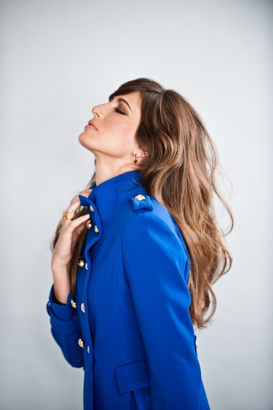 שירה קצנלנבוגן